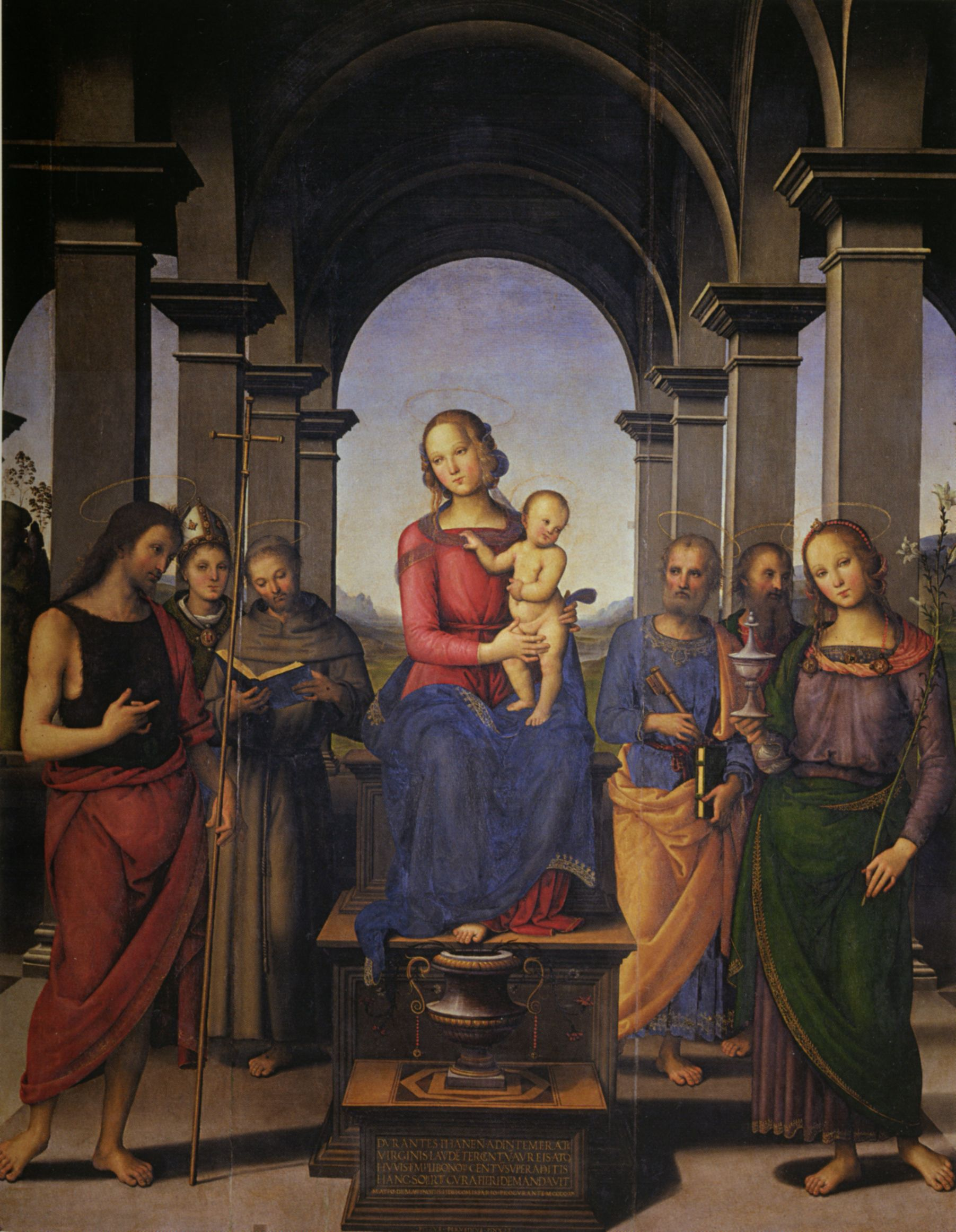 Pietro Perugino: Pala di Fano (Madonna in trono col Bambino tra i Santi Giovanni Battista, Ludovico, Francesco e Pietro, Paolo e la Maddalena). Cat. no. 45 in Vittoria Garibaldi: Perugino. Catalogo completo. Octavo, Firenze 2000, ISBN 88-8030-091-1